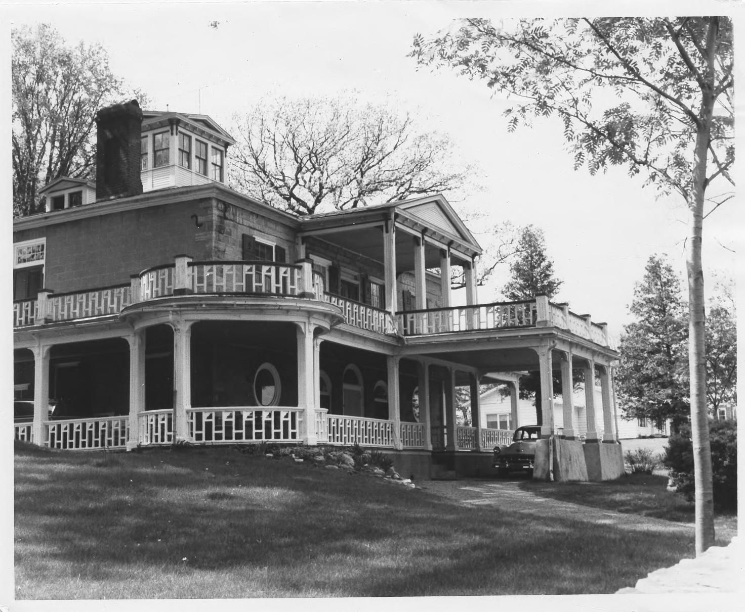 Elkanah Watson House